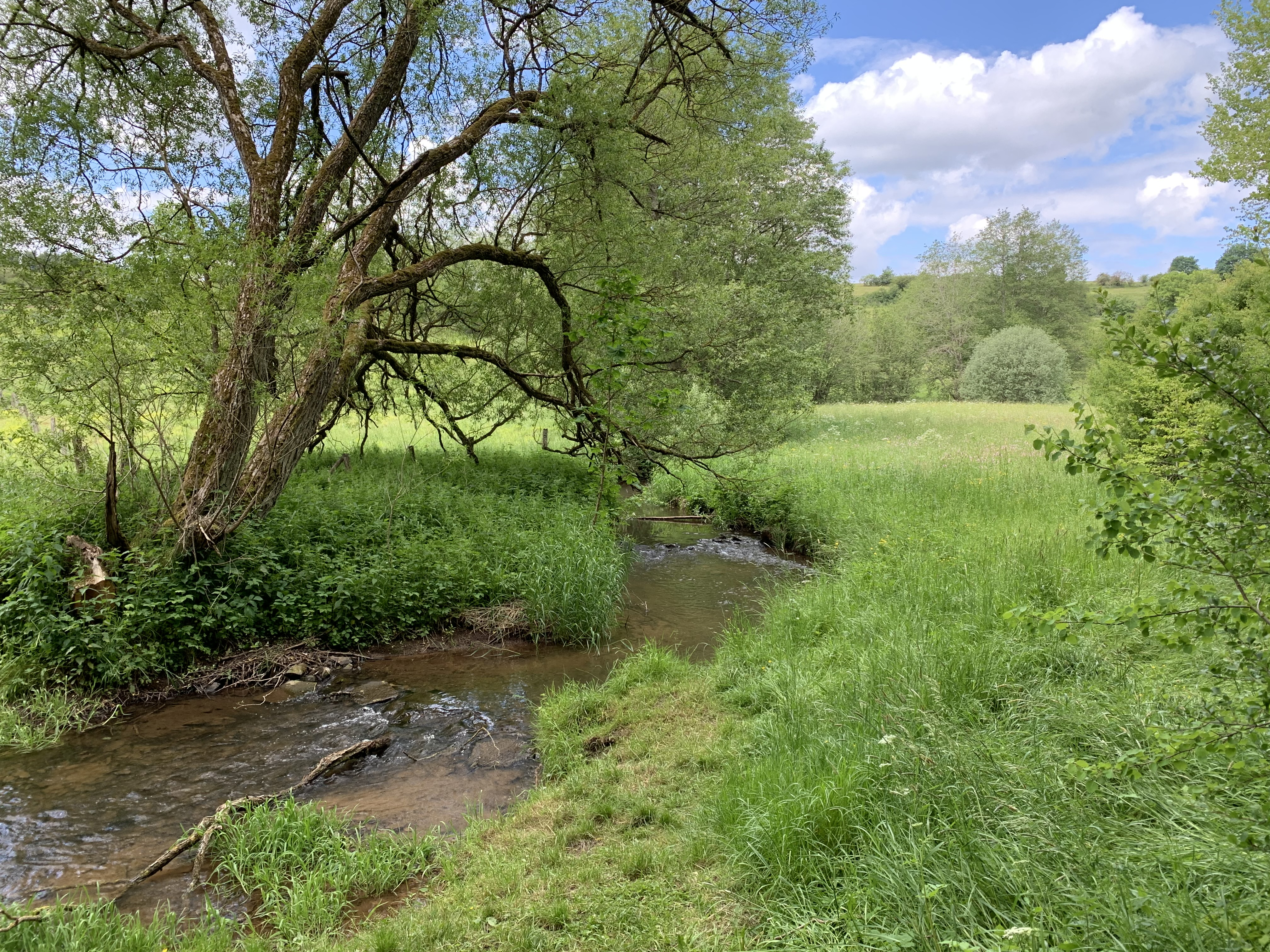 Das Naturschutzgebiet Glaadtbachtal mit Nebenbächen ist ein 72,4 Hektar großes NSG in Dahlem, Kreis Euskirchen in NRW